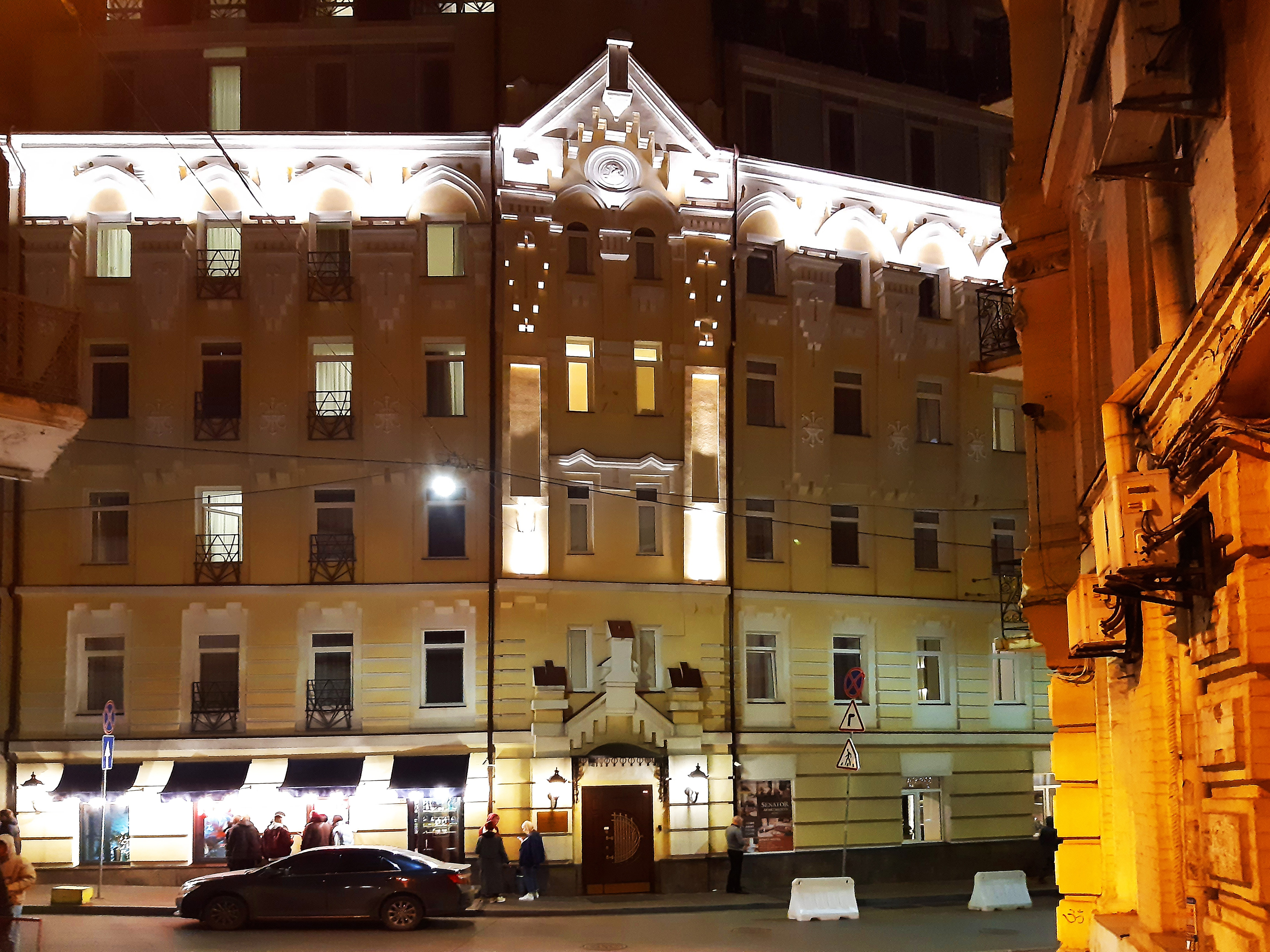 Прибутковий будинок у провулку Шевченка, Київ, провулок Тараса Шевченка, 8б